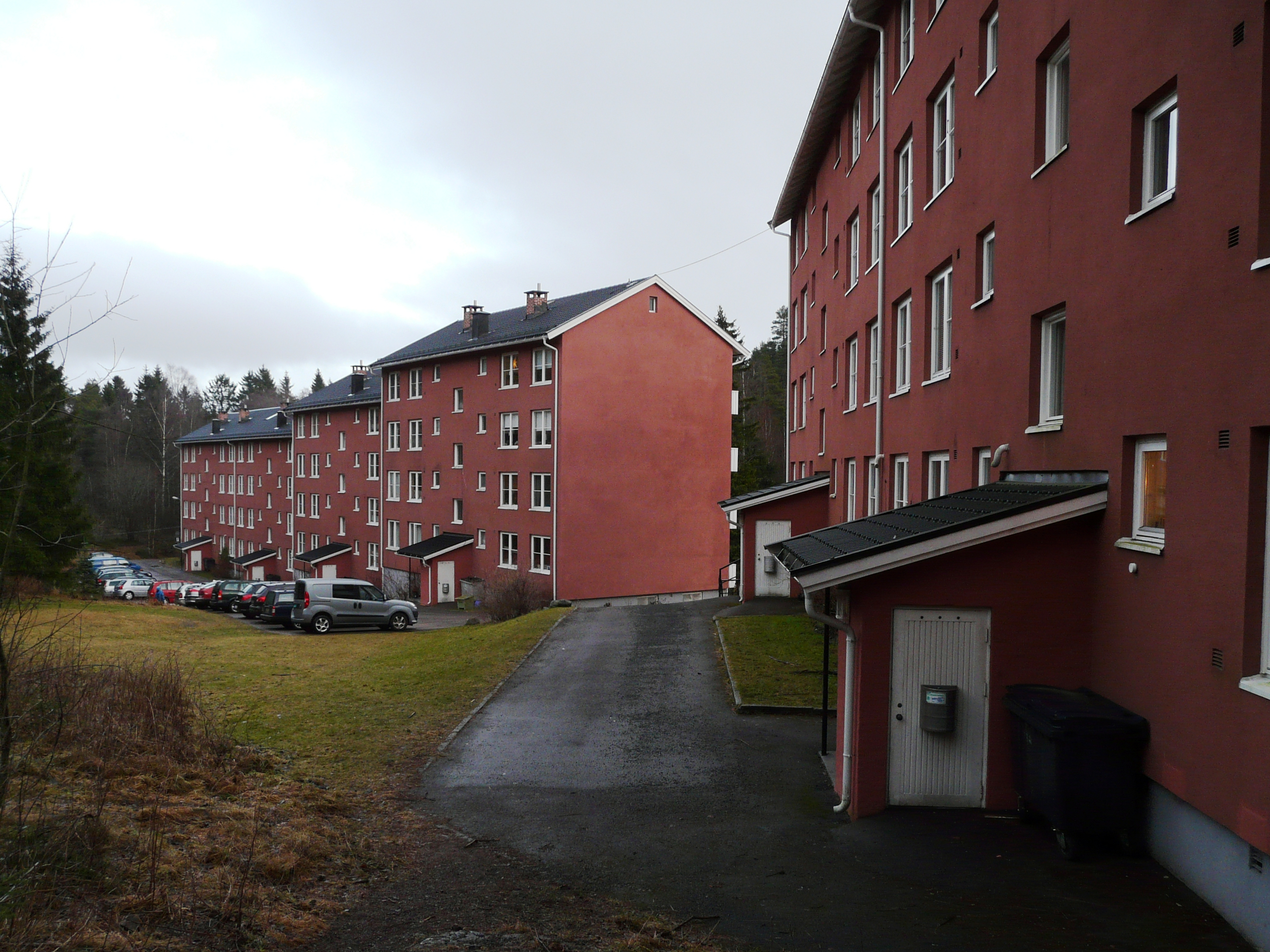 Blokker ved inngangen til Lillomarka, på Tonsenhagen, Oslo